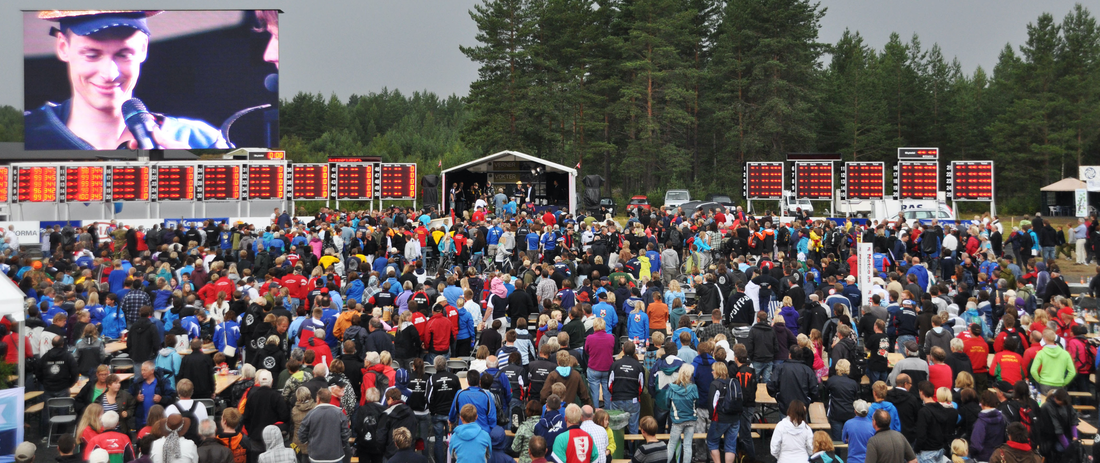 LS2010